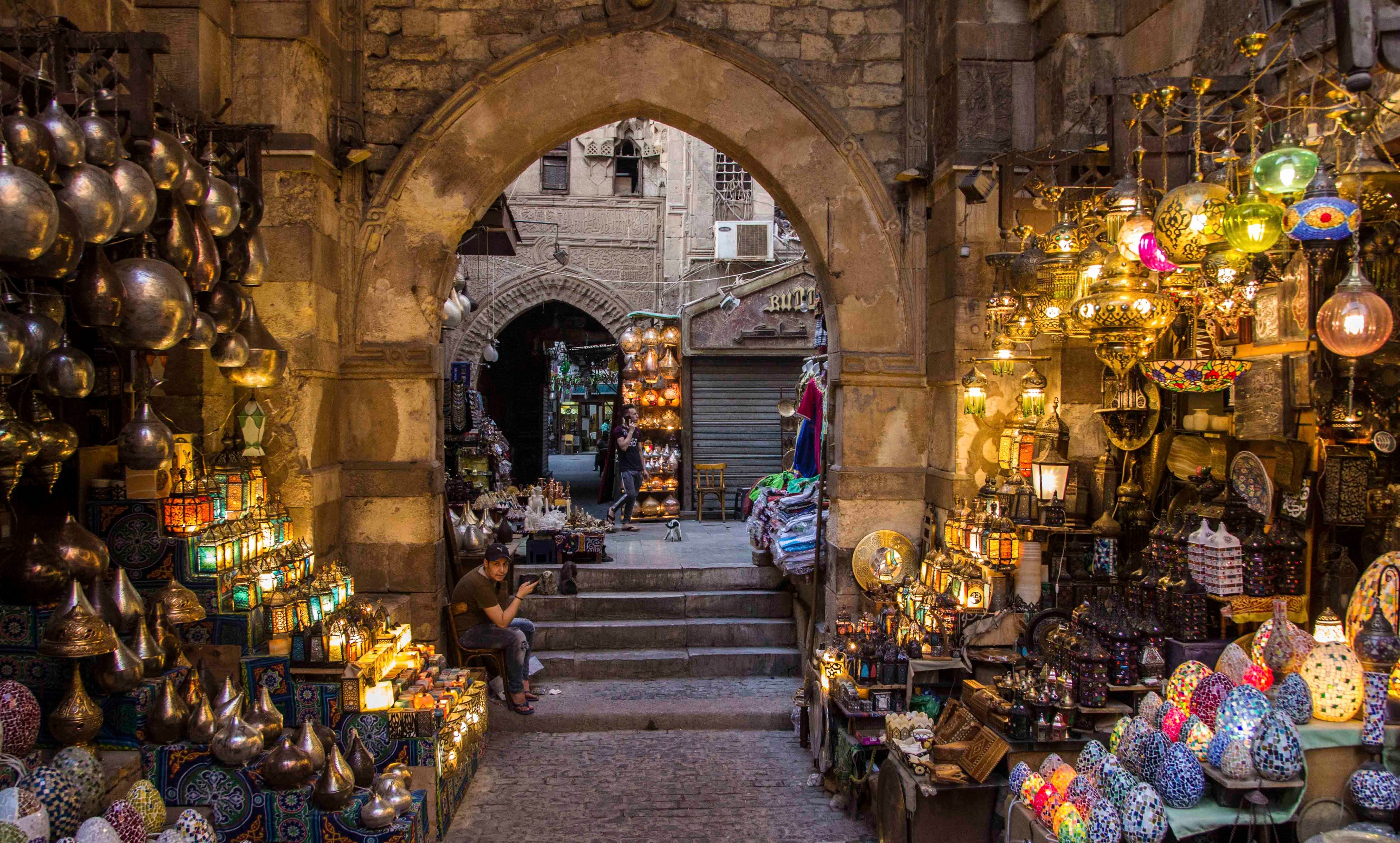 خان الخليلي 1